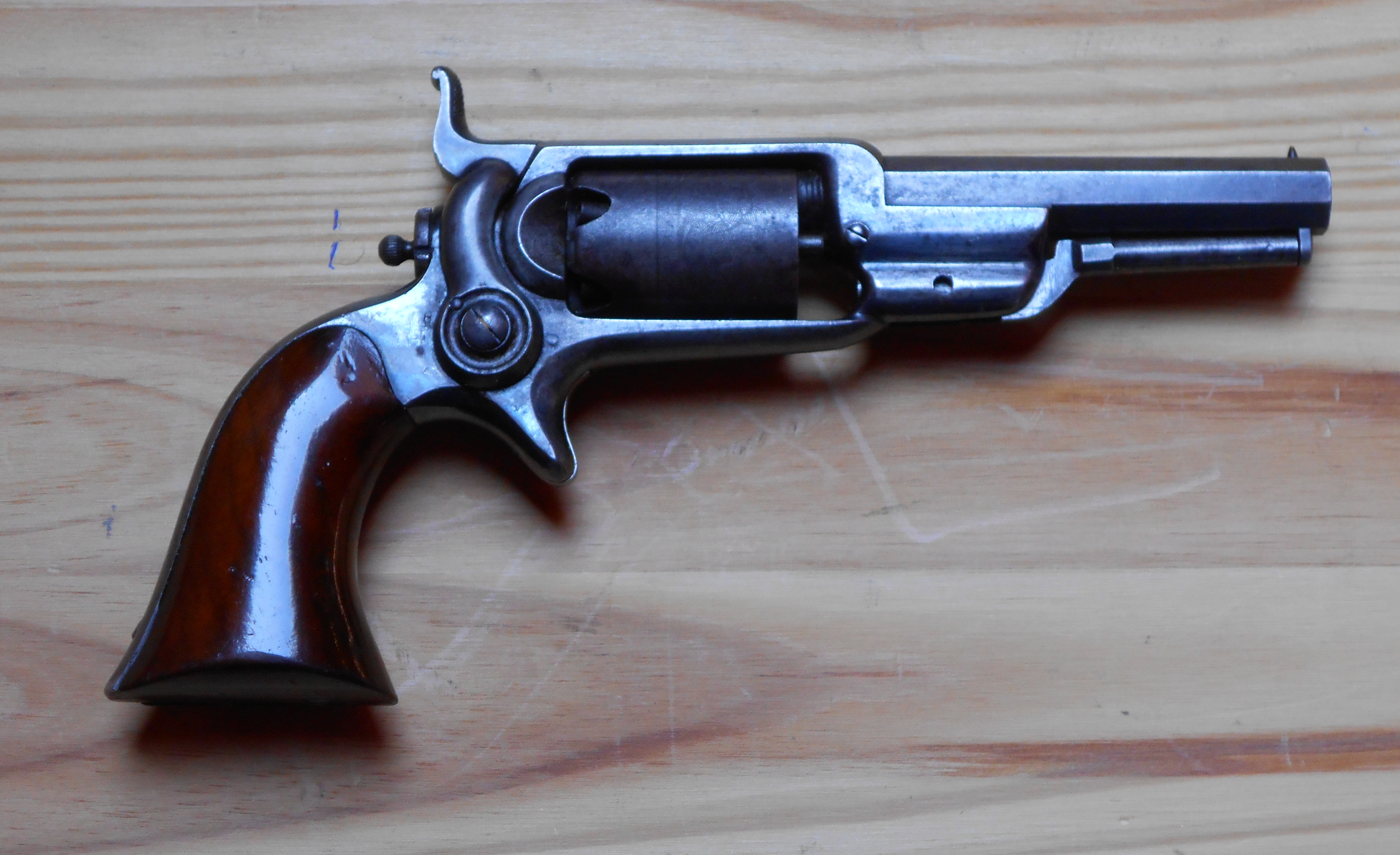 Colt Root M1855 Lauf achteckig